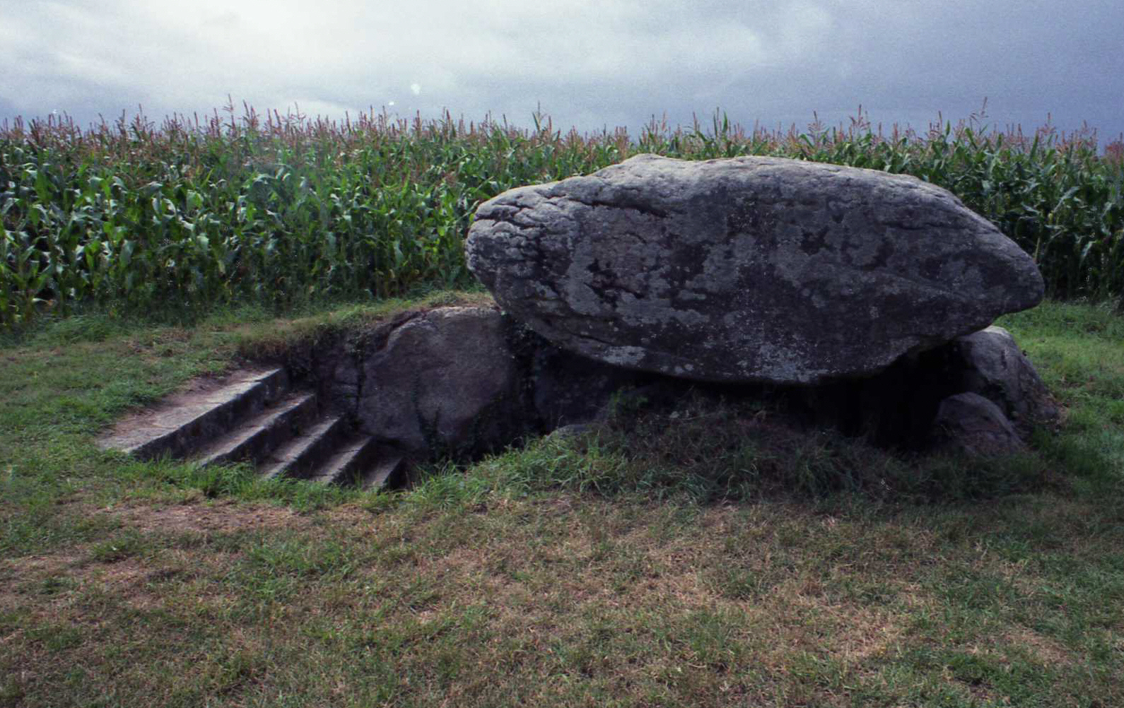 Runesto 2